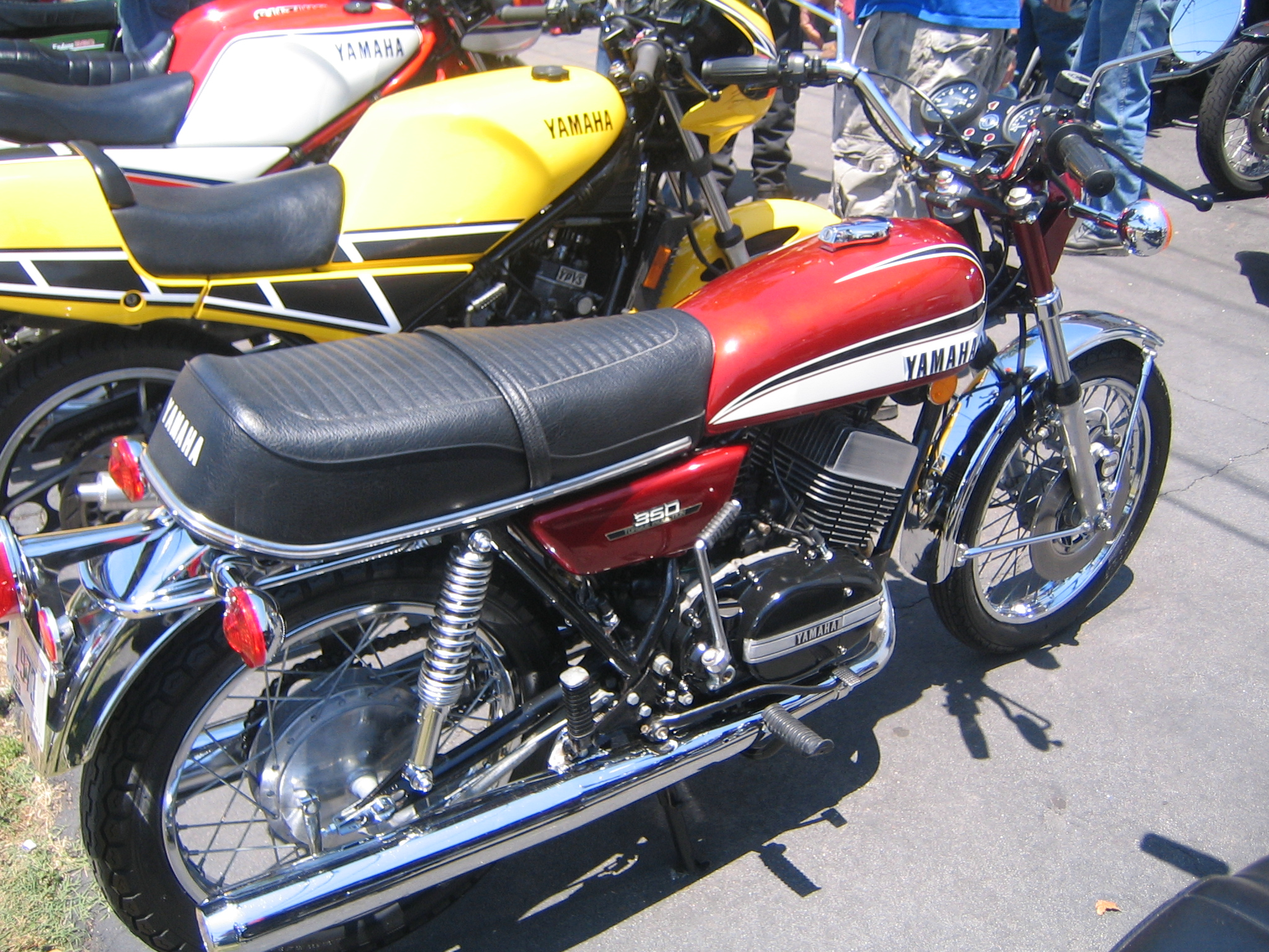 Yamaha RD350